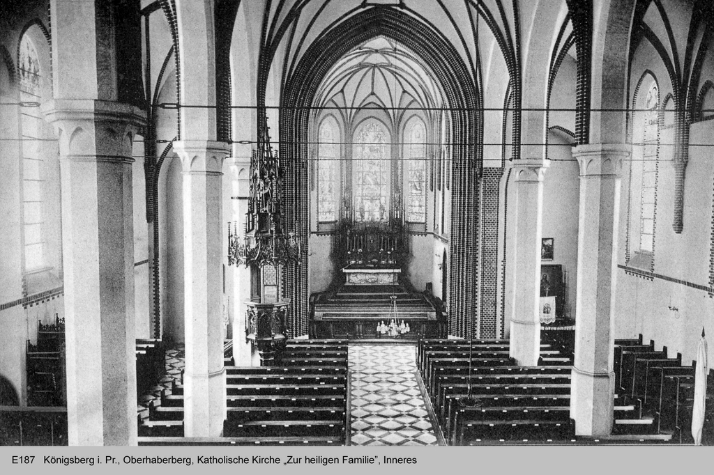 Kirche zur heiligen Familie Königsberg